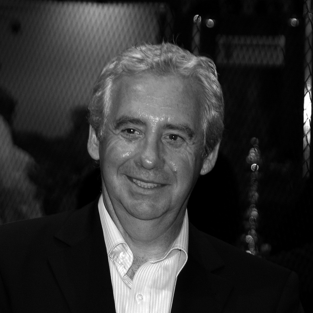 Erwin Kremers auf der Rheingolf Messe in Köln am Stand von „JG Golf“